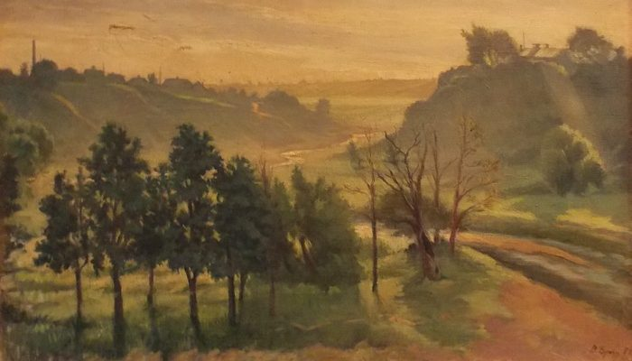 Валянцін Дзежыц. Раніца на Віцьбе